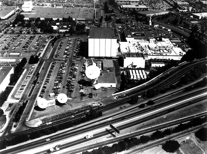 Die US Air Force Satellite Control Facility (CSTC) auf der Sunnyvale AFS, Kalifornien, Anfang bis Mitte der 80-er Jahre der 20. Jahrhunderts - damals die einzige Einrichtung der US-Luftwaffe dieser Art.